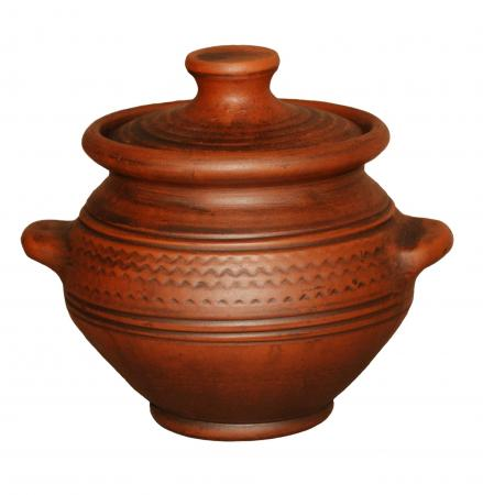 Глиняный горшочек для запекания всевозможные блюда традиционной русской кухни. ООО «Гончар»